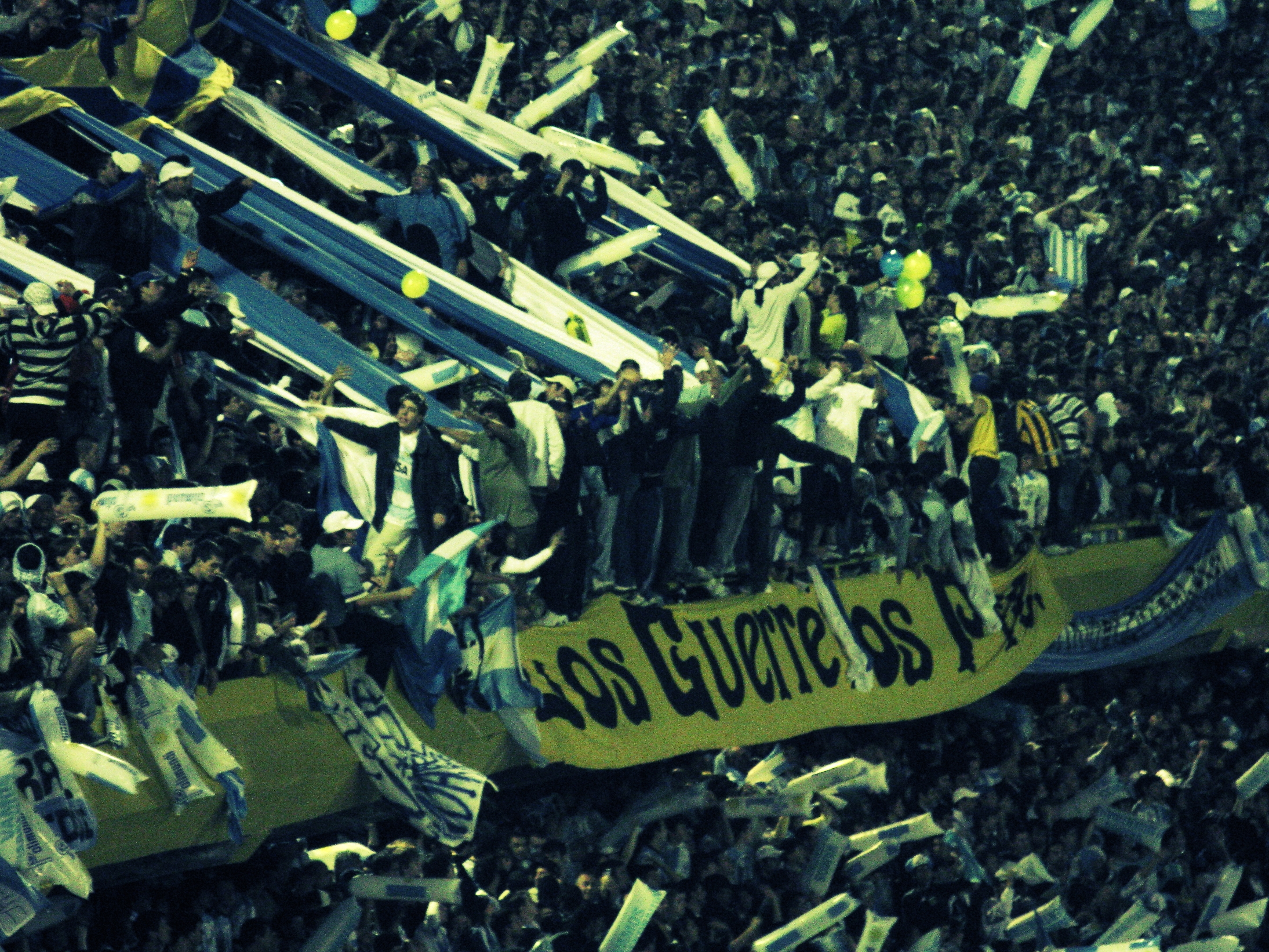 Imagen de la tribuna popular norte del Gigante de Arroyito en el partido por Eliminatorias Sudamericanas para la Copa del Mundo 2010, Argentina versus Brasil, el 11 de septiembre de 2009